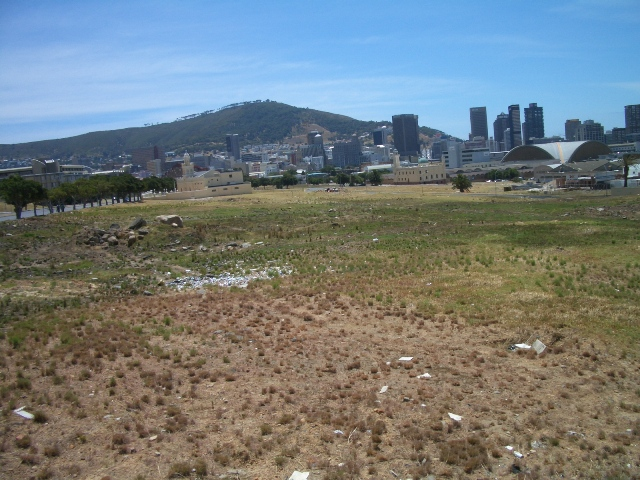 Brachland am ehemaligen District Six in Kapstadt